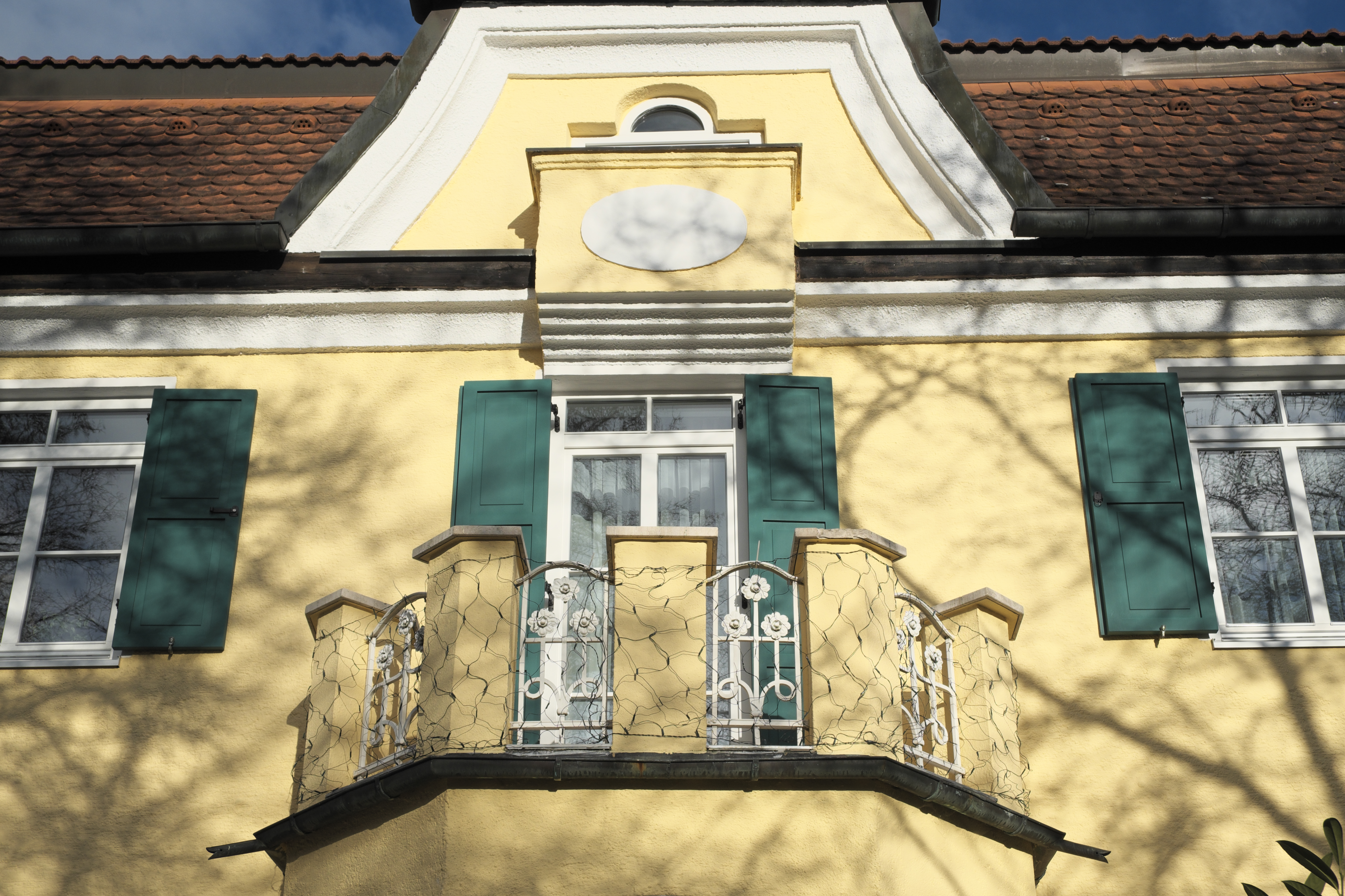 Villa in der Marschnerstraße 24 in Pasing im Stadtbezirk Pasing-Obermenzing in München (Bayern/Deutschland), 1902 von Otto Numberger errichtet, Balkon